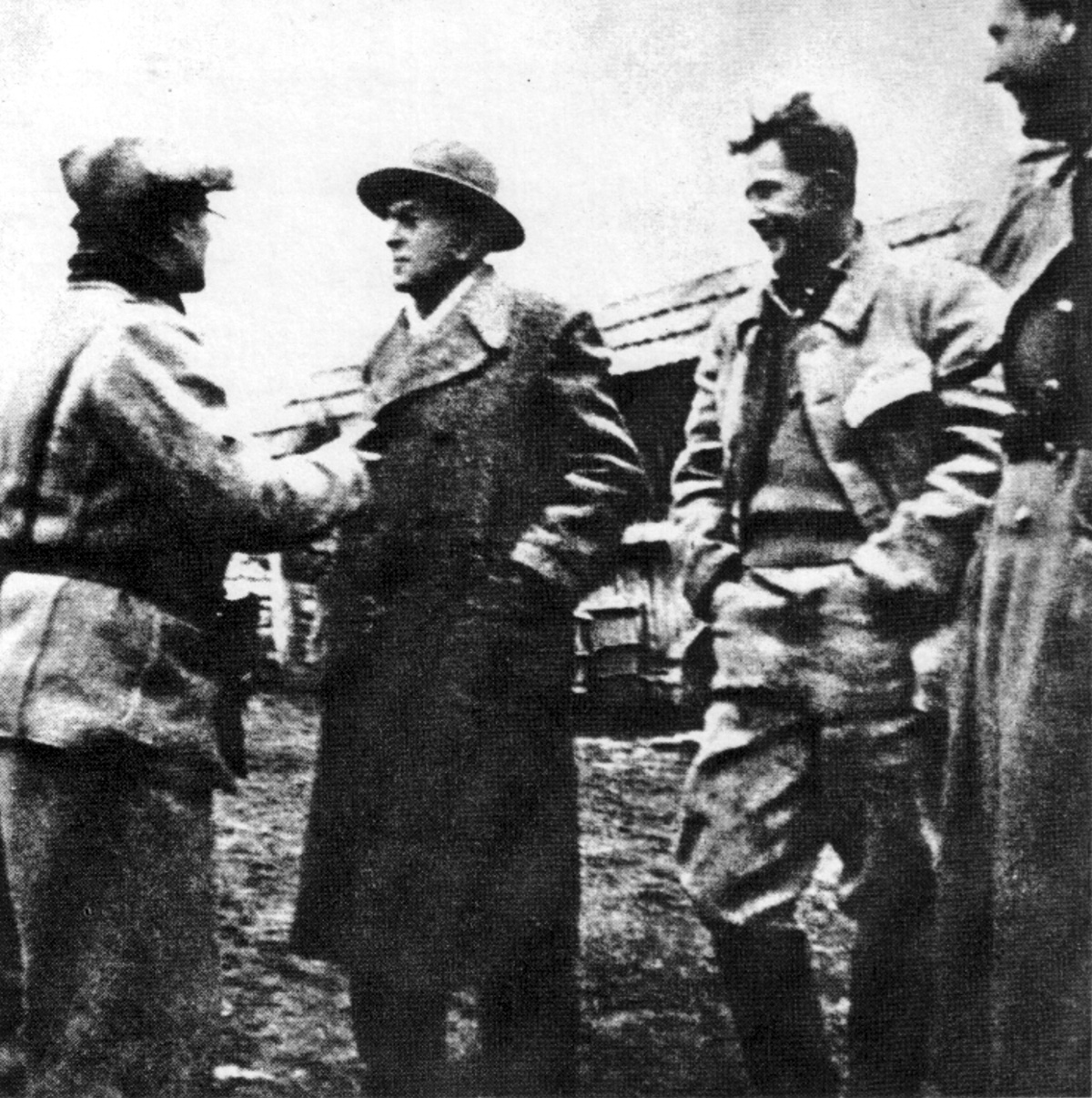 Srpskohrvatski / српскохрватски: Veselin Masleša, Vladimir Nazor, Milovan Đilas i Pavle Ilić-Veljko.